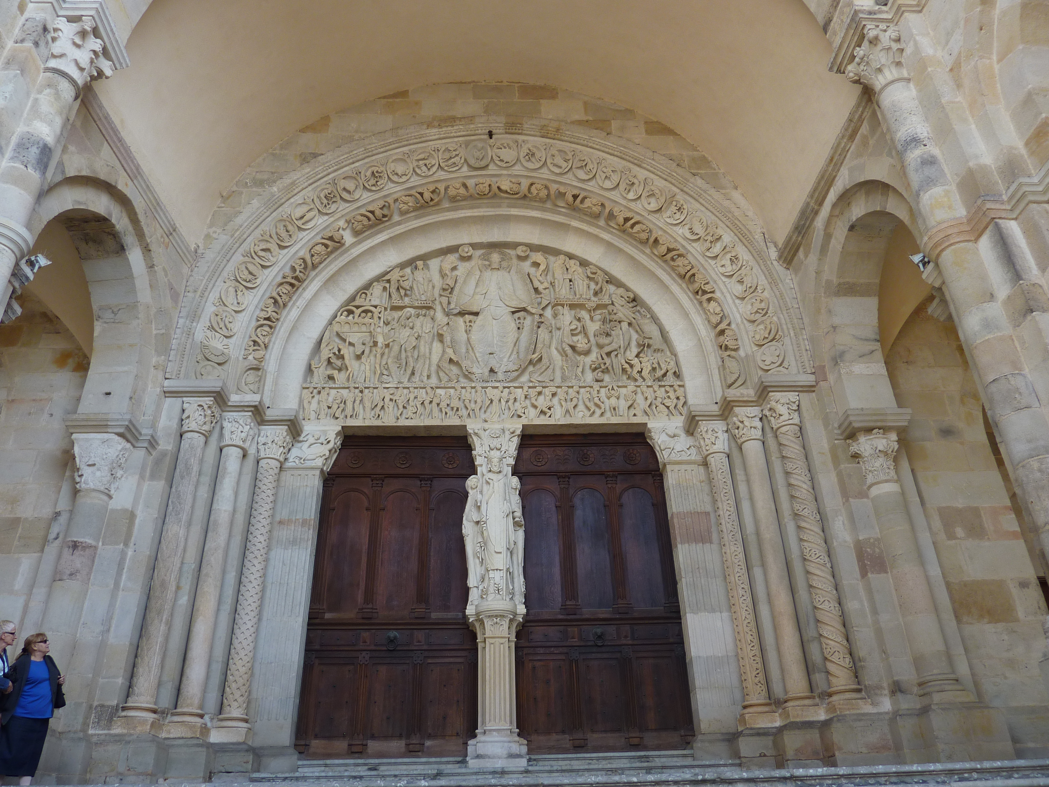 Autun : cathédrale Saint-Lazare, le tympan